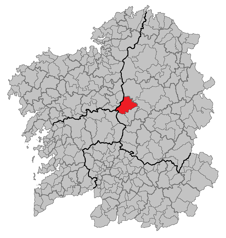 Mapa coa localización do concello de Palas de Rei.